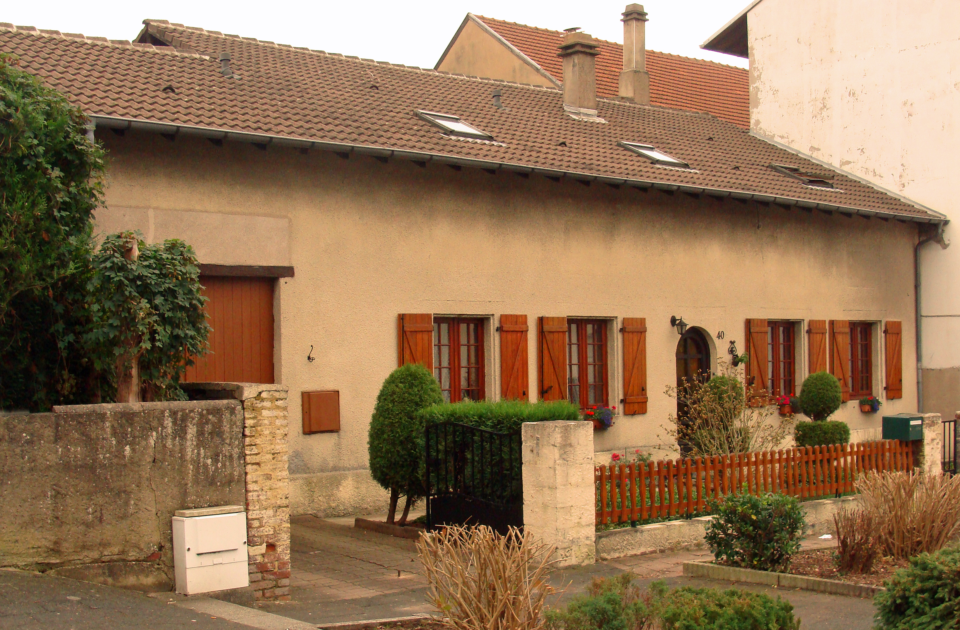 Ancien presbytère de L'Hôpital (Moselle), reconstruit en 1867 sur l'emplacement d'un presbytère datant du XVIIIe siècle. Il va servir jusqu'en 1894, date à laquelle ce bâtiment fut échangé contre une maison d’habitation plus proche de l’église, la maison d’Amélie Becker. La topographie du lieu conserve le souvenir d’une occupation cléricale ancienne : dès juin 1836, Marquis, le géomètre du Cadastre, nomme le lieu-dit situé à l’arrière du presbytère Hinter Herren Garten, ce qui signifie « Derrière le jardin du curé ».